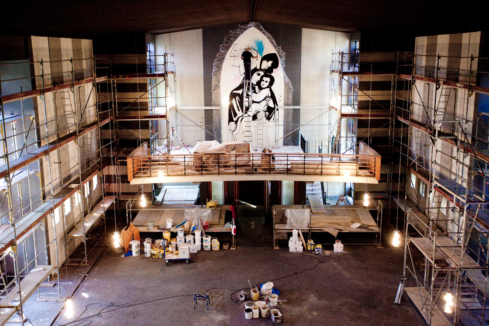 Der Innenraum der katholischen Kirche "Maria, Hilfe der Christen" des Ortes Goldscheuer mit Blick auf die Modanna und der Künstler bei der Arbeit